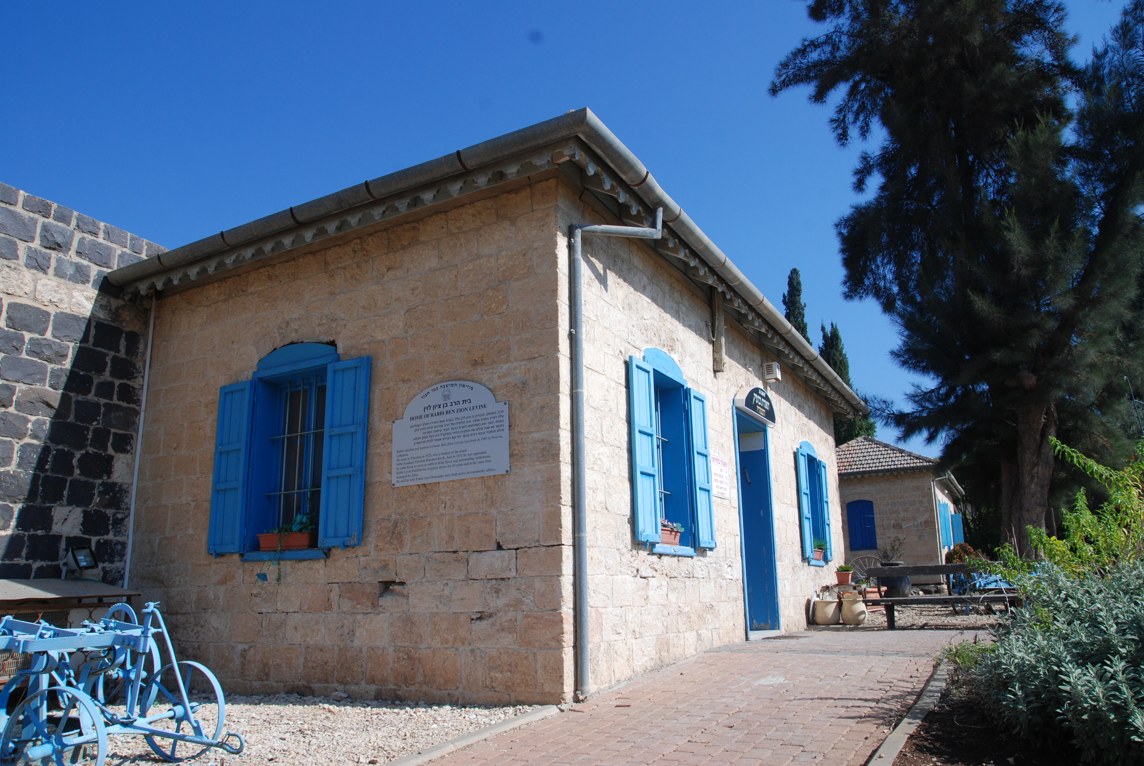 חצר הראשונים בכפר תבור